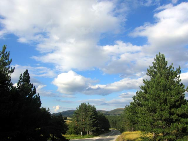 Description:Природне лепоте Златибора author: Snezana Trifunovic Source: self-made